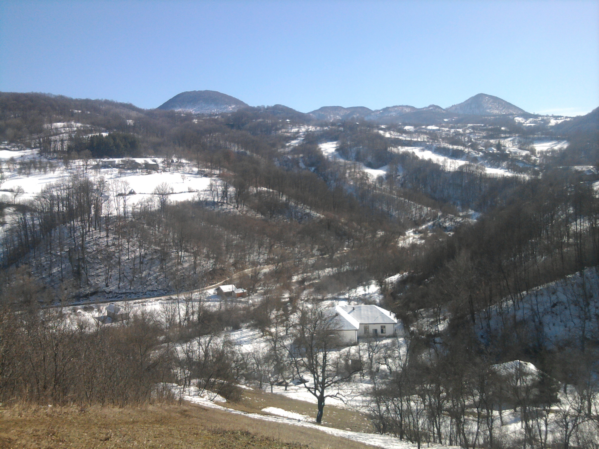 NA SREDINI SLIKE NALAZI SE OSNOVNA CETVOROGODISNJA SKOLA ,,20.OKTOBAR, A SA LEVE I DESNE STRANE, NALAZE SE KUCE MESTANA. SLIKA SNIMLJENA 02.01.2012. SLIKANO SA BRDA NAZVANO ,,ZARJE AUTOR: IvanaIxy